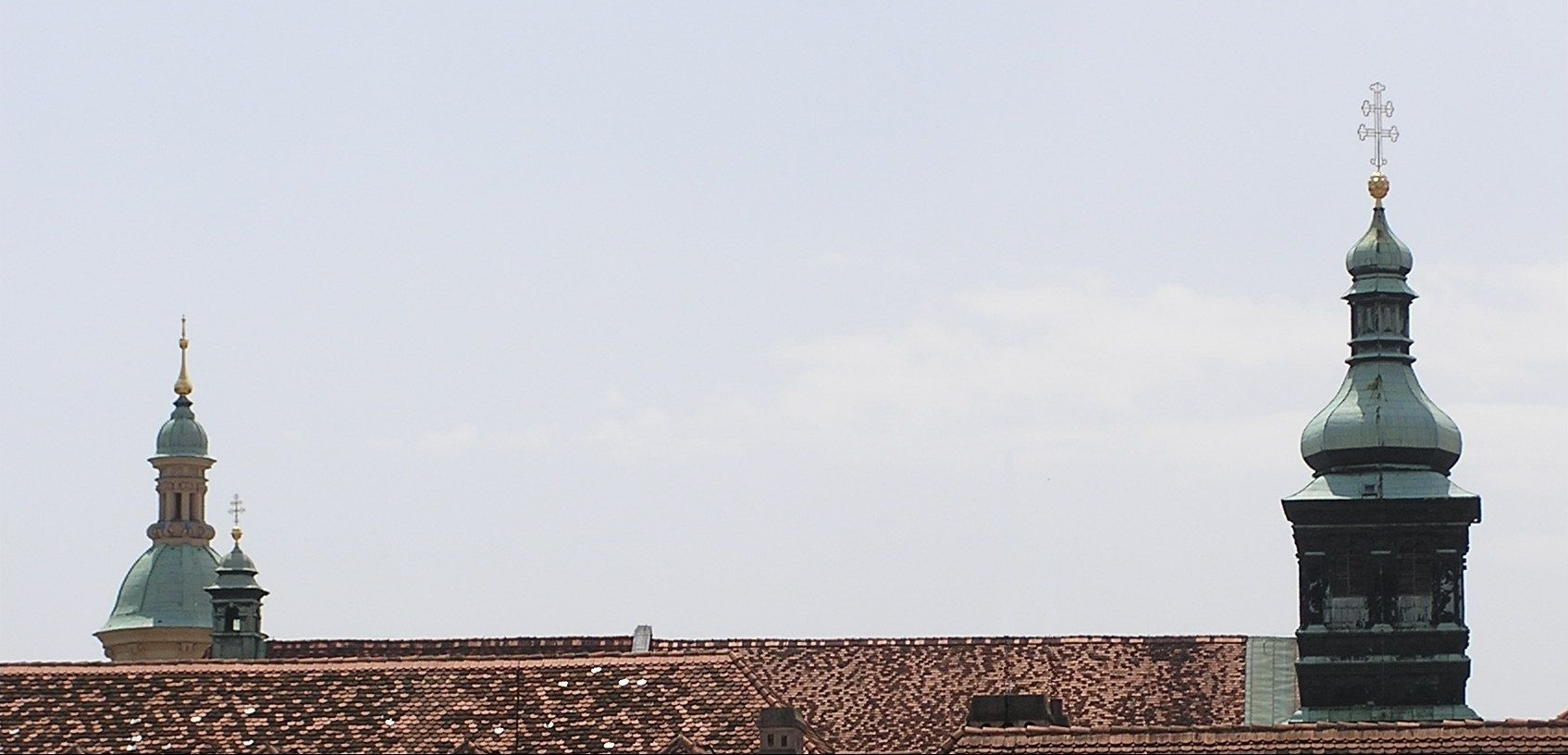 Dach des Grazer Doms (mit großem und kleinem Dachreiter)